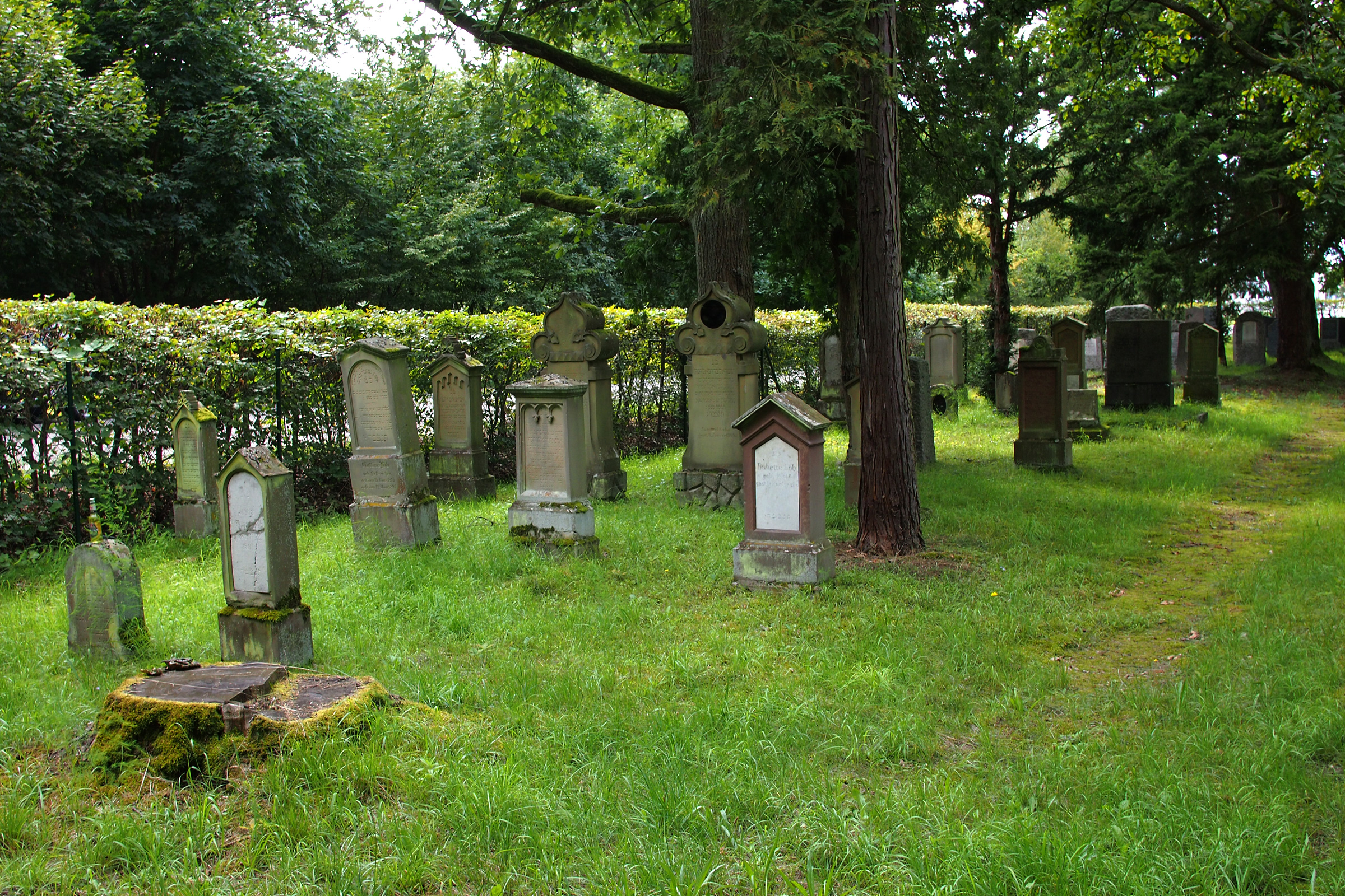 Jüdischer Friedhof Philippsburg